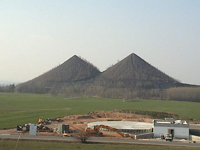 Die Reuster Halden bei Ronneburg (29. März 2004).